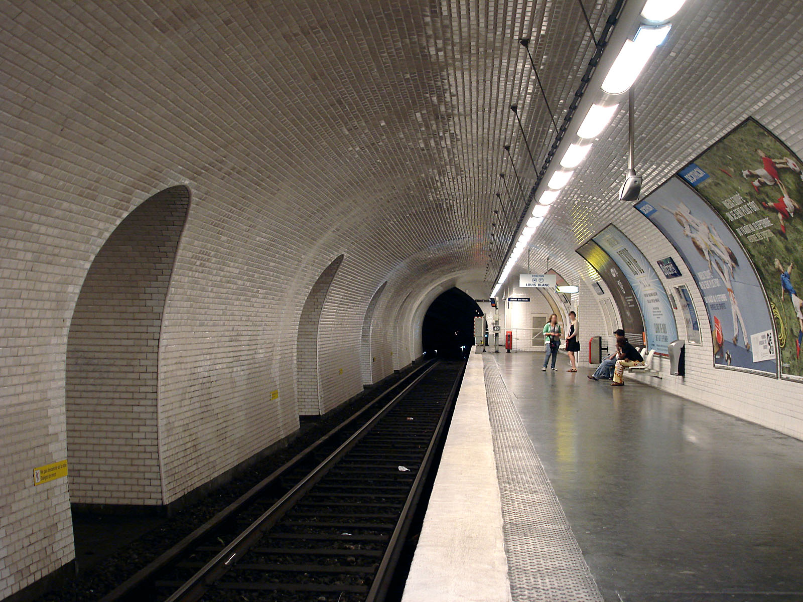 Station Botzaris de la ligne 7 bis du métro de Paris, France.